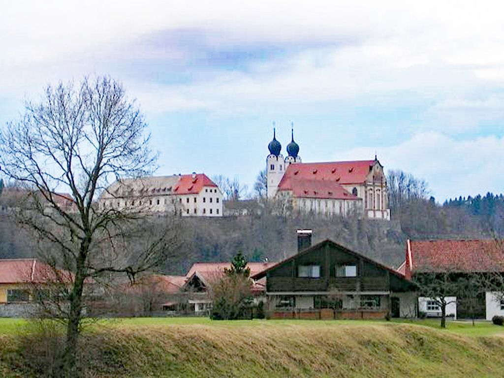 Aufnahme aus dem Jahr 1993 (?). Selbst erstellt. GNU-FDL. --Lou Gruber 22:05, 11. Sep 2004 (CEST)